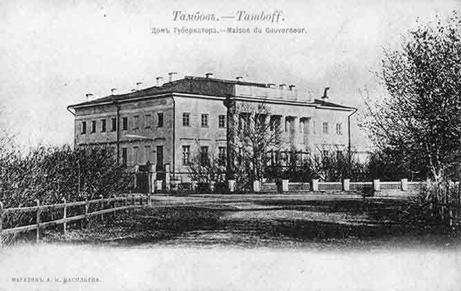 Тамбов. Дом губернатора. Располагался на территории нынешггео городского парка культуры и отдыха. На его месте сейчас памятный знак к 350-летию Тамбова.